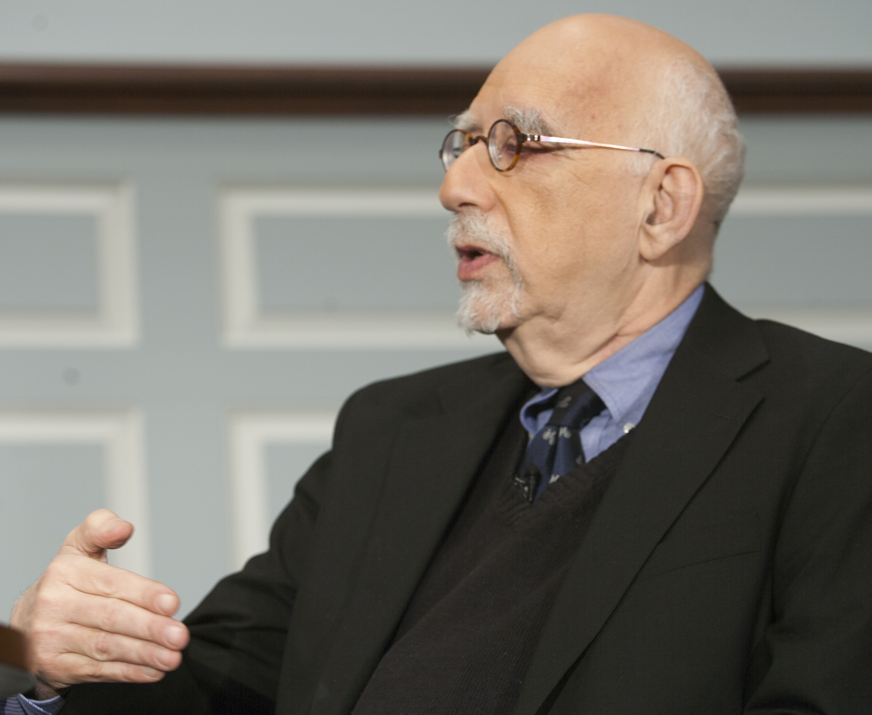 RS3J4421